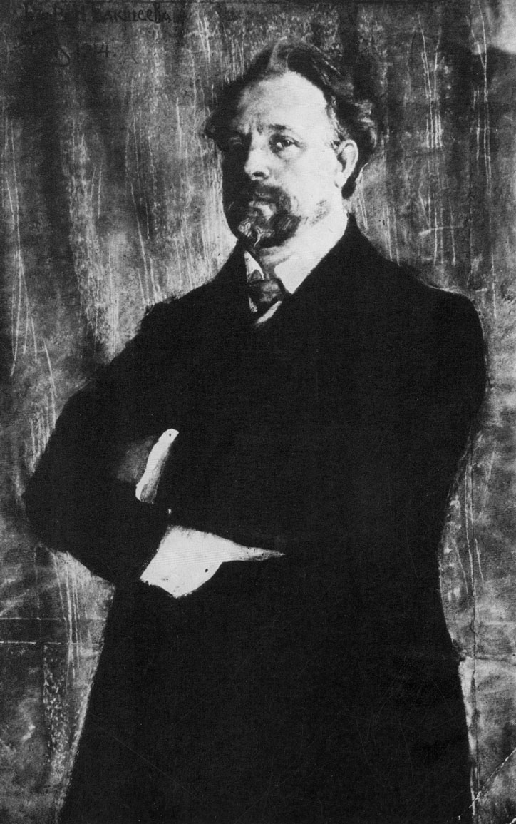 С. В. Малютин. Портрет В. Н. Бакшеева. X., пастель. 1914. Собрание А. В. Бакшеевой